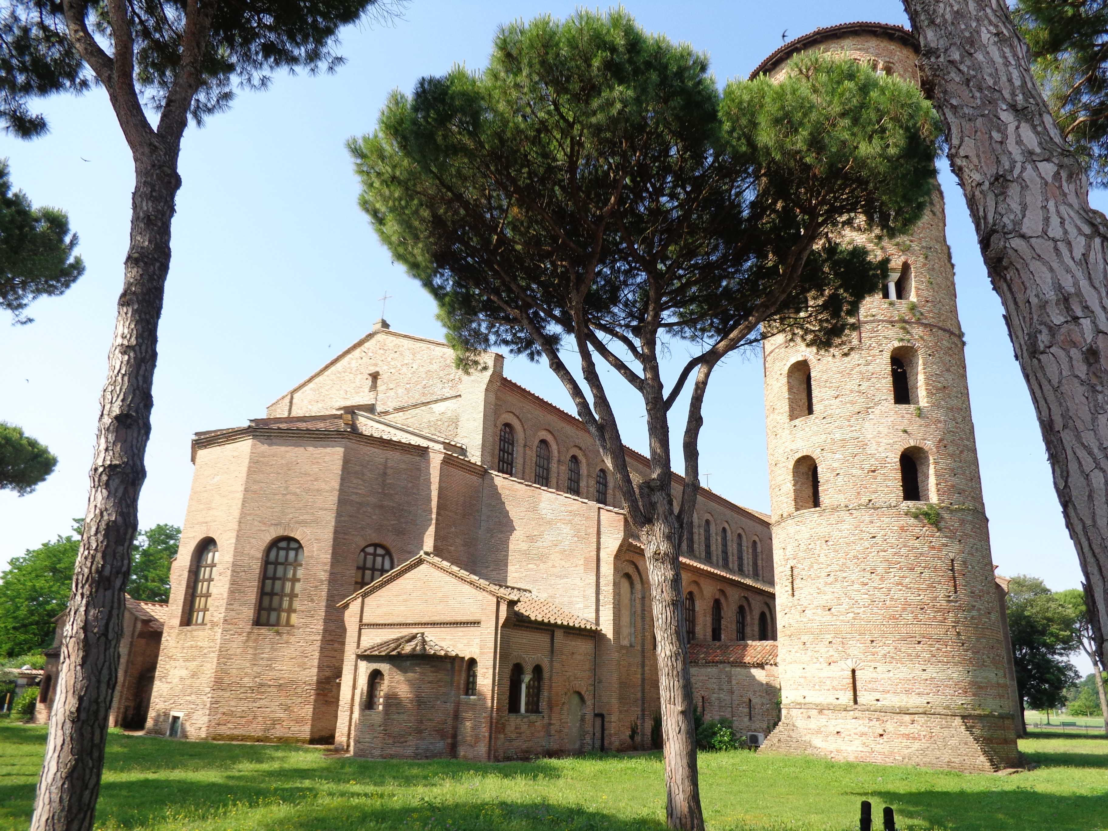 Sant'Apollinare in Classe, Ravenna This is a photo of a monument which is part of cultural heritage of Italy.